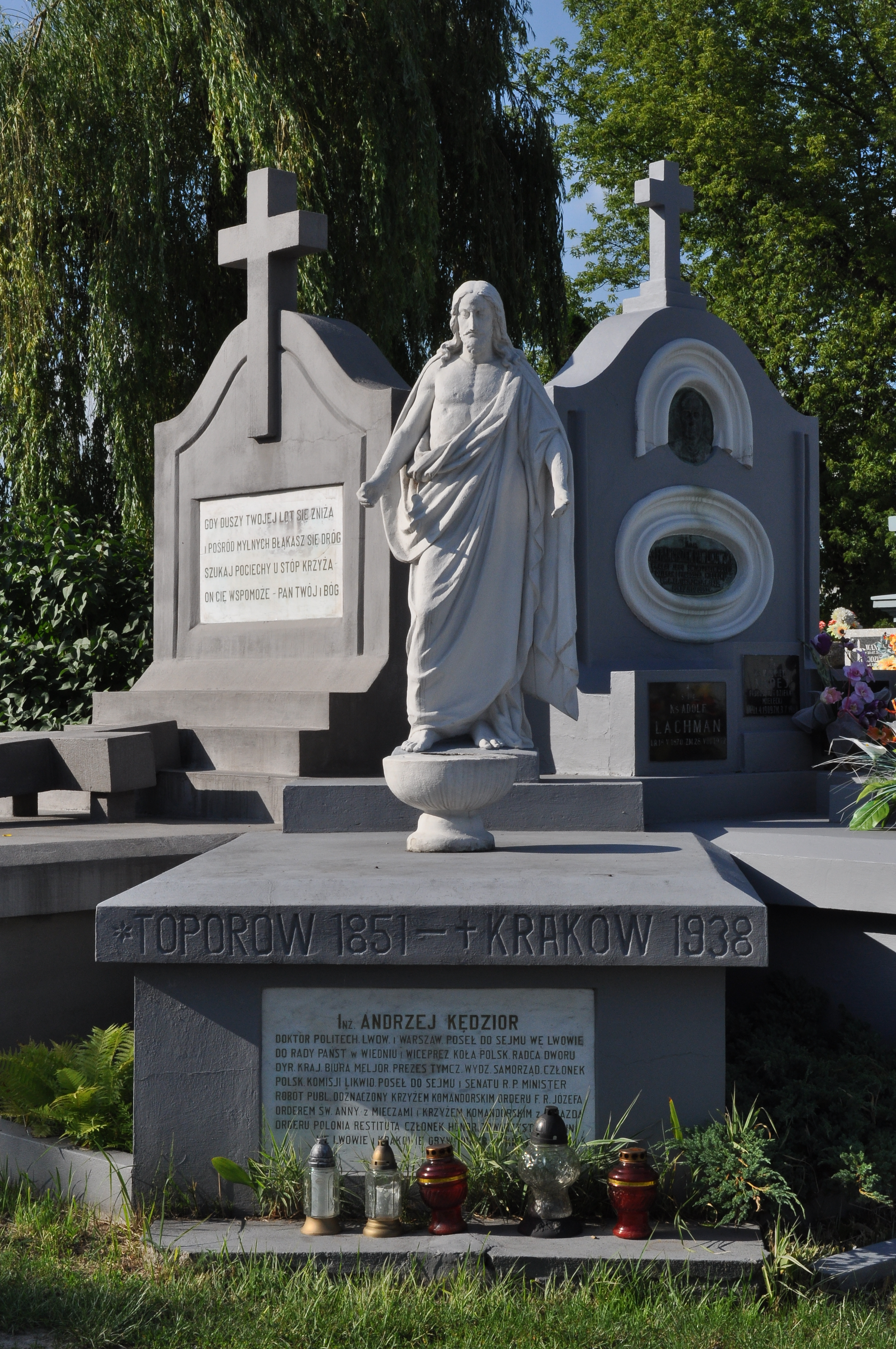 cmentarz parafialny